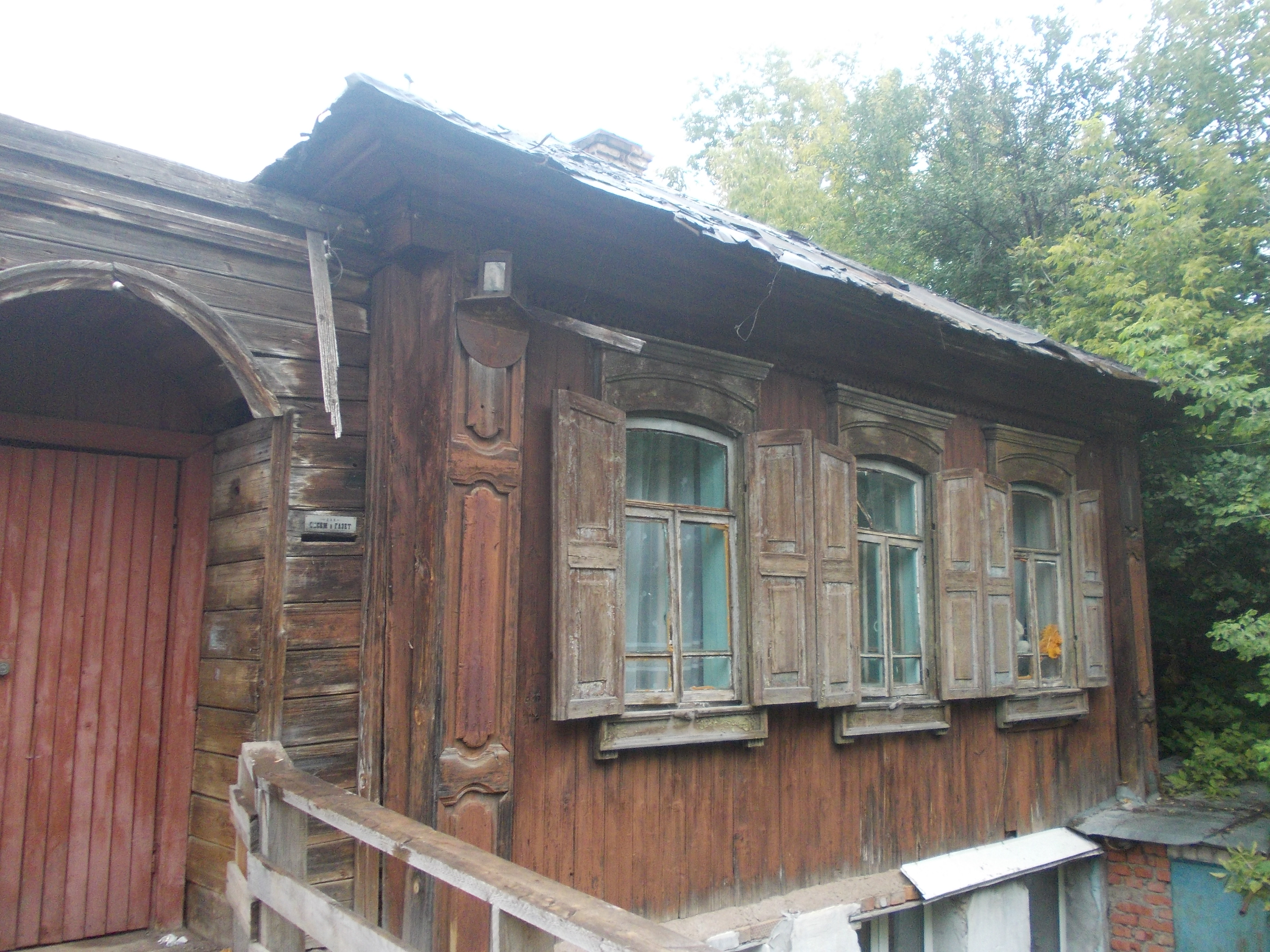 Дом, где жил русский певец Шаляпин Ф. И. (Республика Башкортостан, Уфа, Гоголя улица, 1)